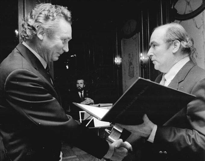 Berlin, Verleihung Heinrich-Greif-Preis, Beyer ADN-ZB Hirndorf 9.3.1984 Berlin: Heinrich-Greif-Preis verliehen Der Stellvertreter des Ministers für Kultur Horst Pehnert (r.) überreichte in der Deutschen Staatsoper den für hervorragende filmkünstlerische Leistungen verliehenen Heinrich-Greif-Preis u.a. an Frank Beyer, Regisseur des DEFA Spielfilme "Der Aufenthalt". Abgebildete Personen: Beyer, Frank: Regisseur, DDR (GND 119217899) Pehnert, Horst: Stellvertreter des Ministers für Kultur, DDR #